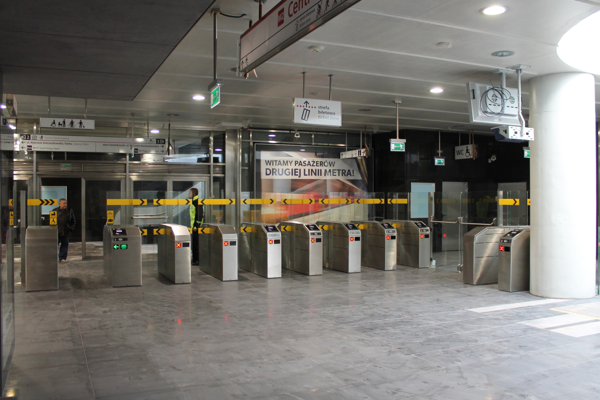 Zachodnia hala odpraw stacji C13 Centrum Nauki Kopernik.